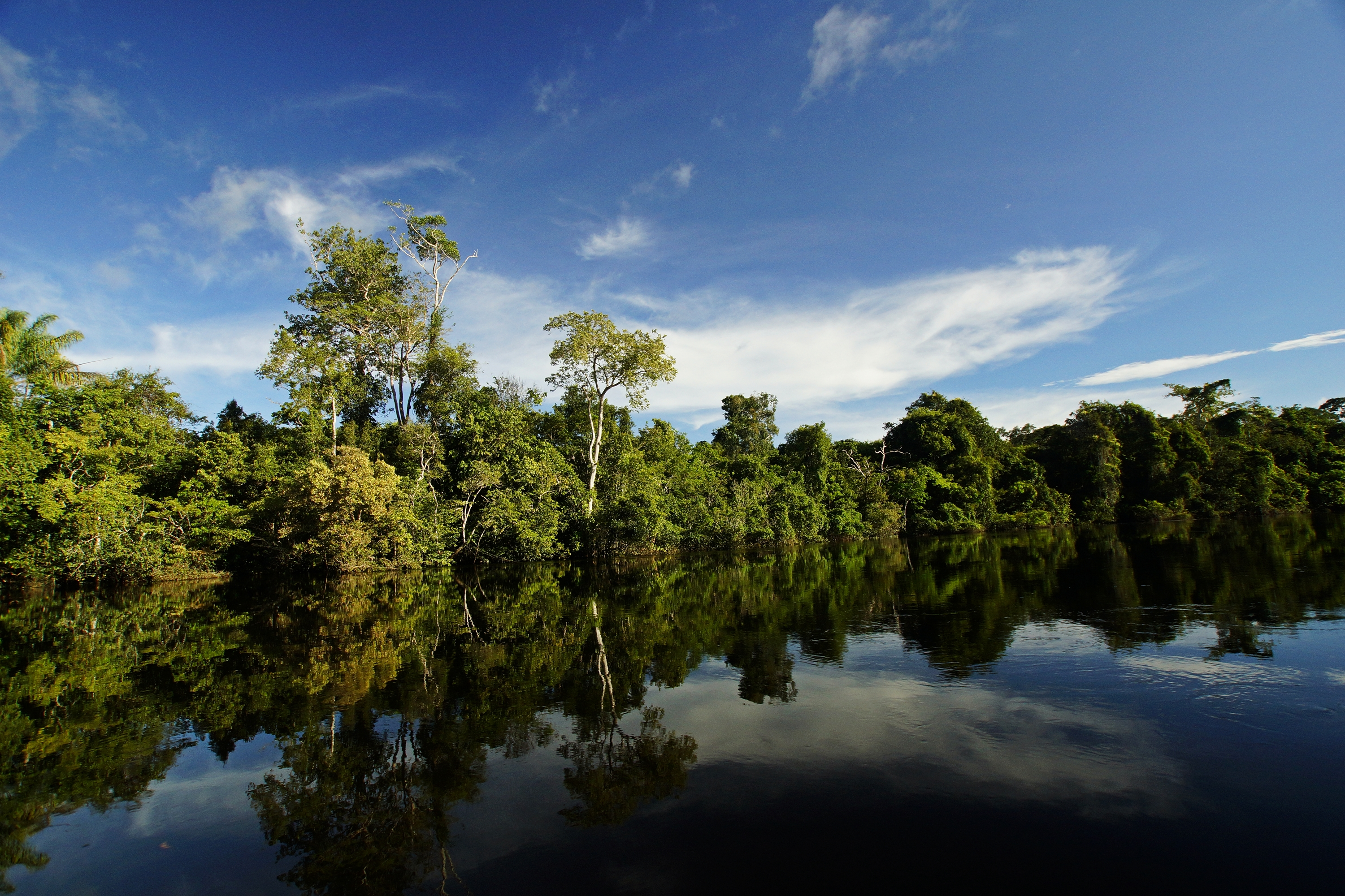 Rio Cristalino estado do Mato Grosso